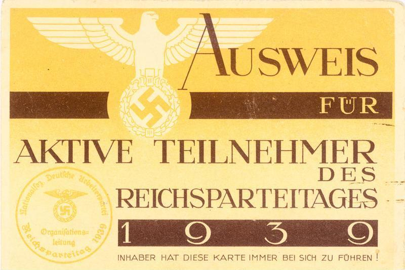 Ausweis für Aktive Teilnahmer des Reichsparteitages 1939